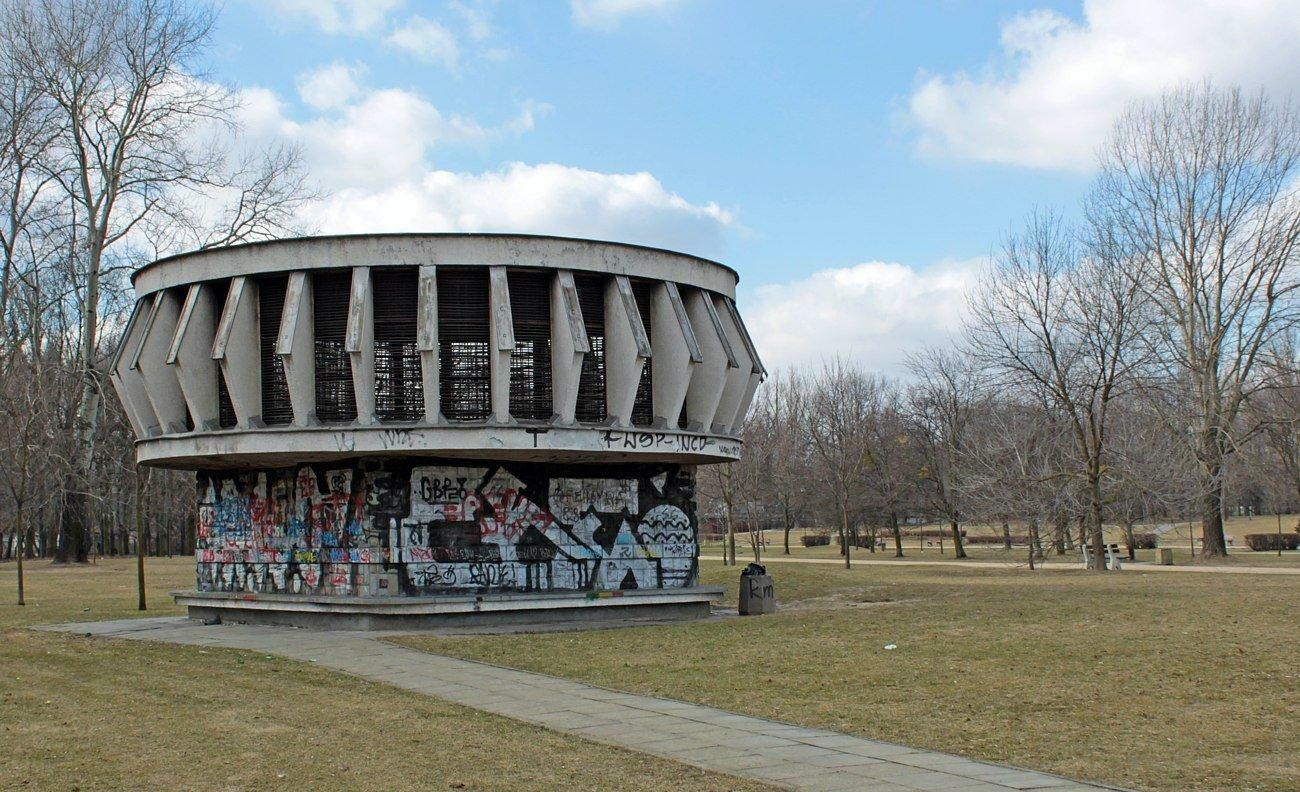 Czerpnio-wyrzutnia szlakowa I linii warszawskiego metra między stacjami A10 Pole Mokotowskie i A11 Politechnika, usytuowana na Polu Mokotowskim.